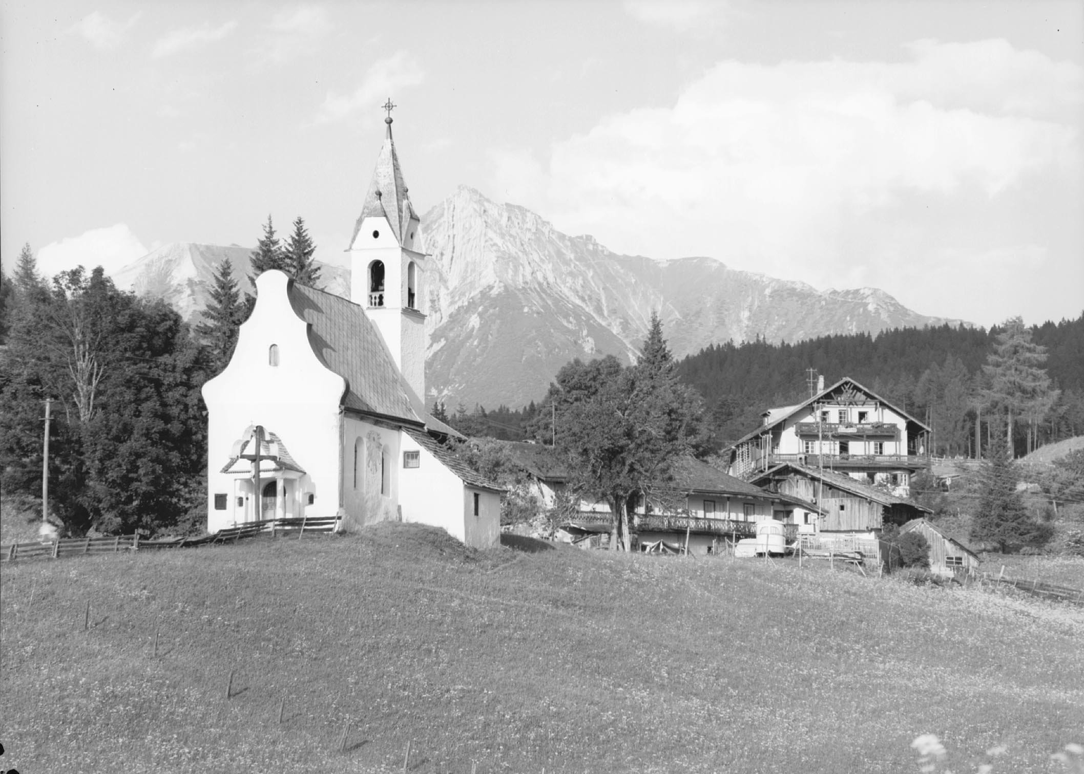 [Kirche in Mösern gegen Reitherspitze / Tirol]